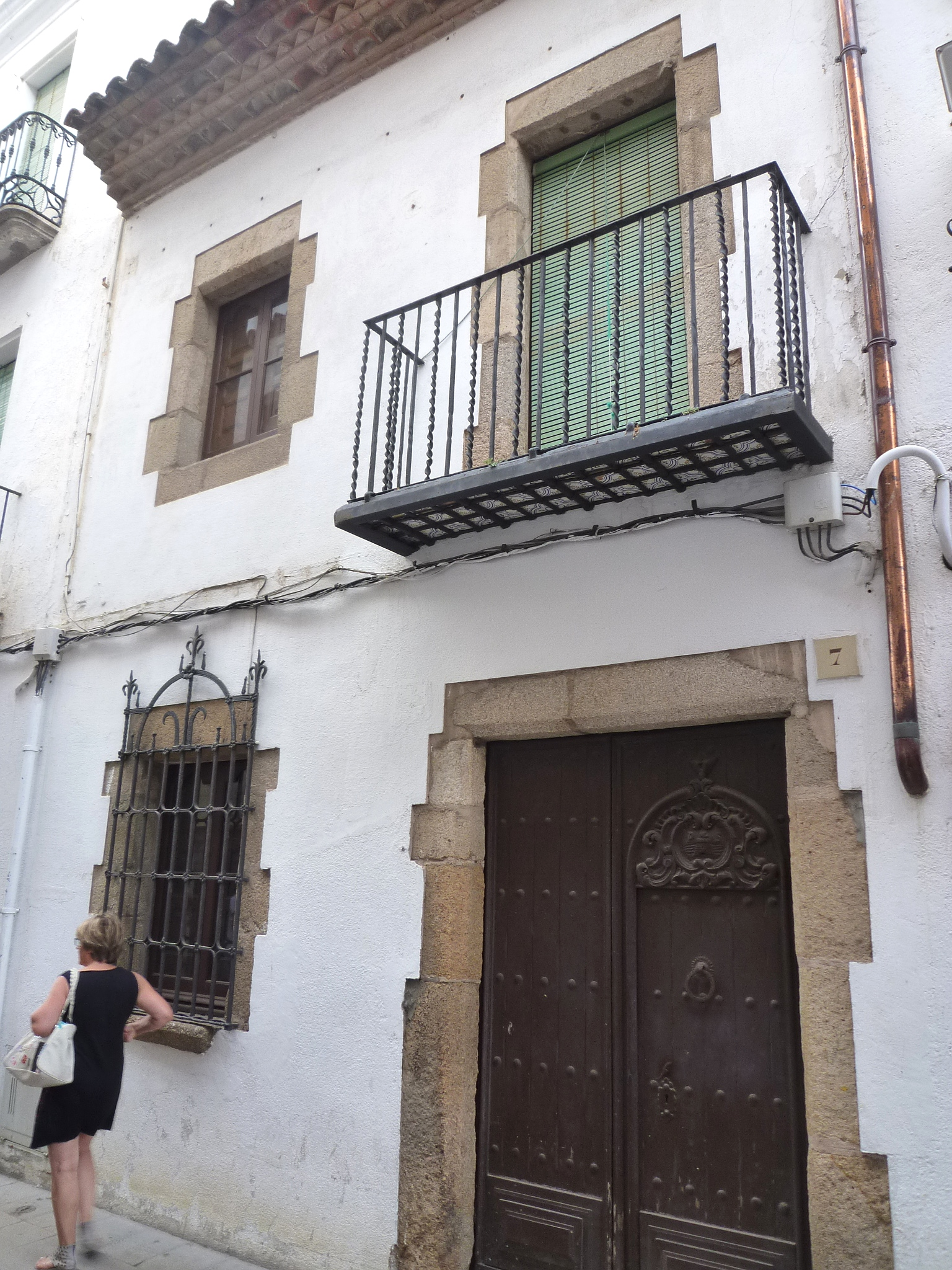 Habitatge al carrer Portal, 7 (Tossa de Mar)